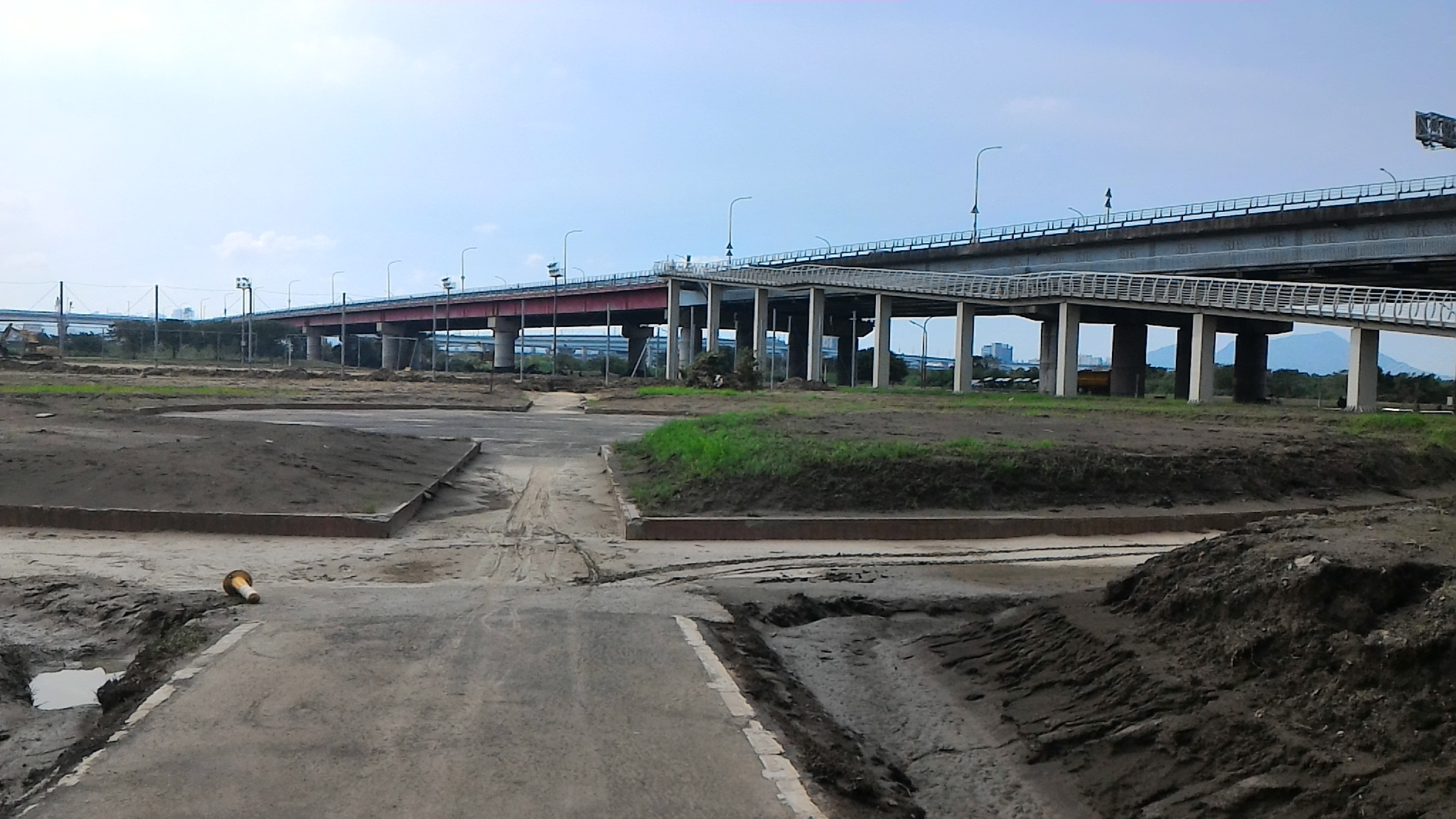 Bân-lâm-gú: 佇雙園河濱公園翕華江橋，橋過去彼爿是新北市。